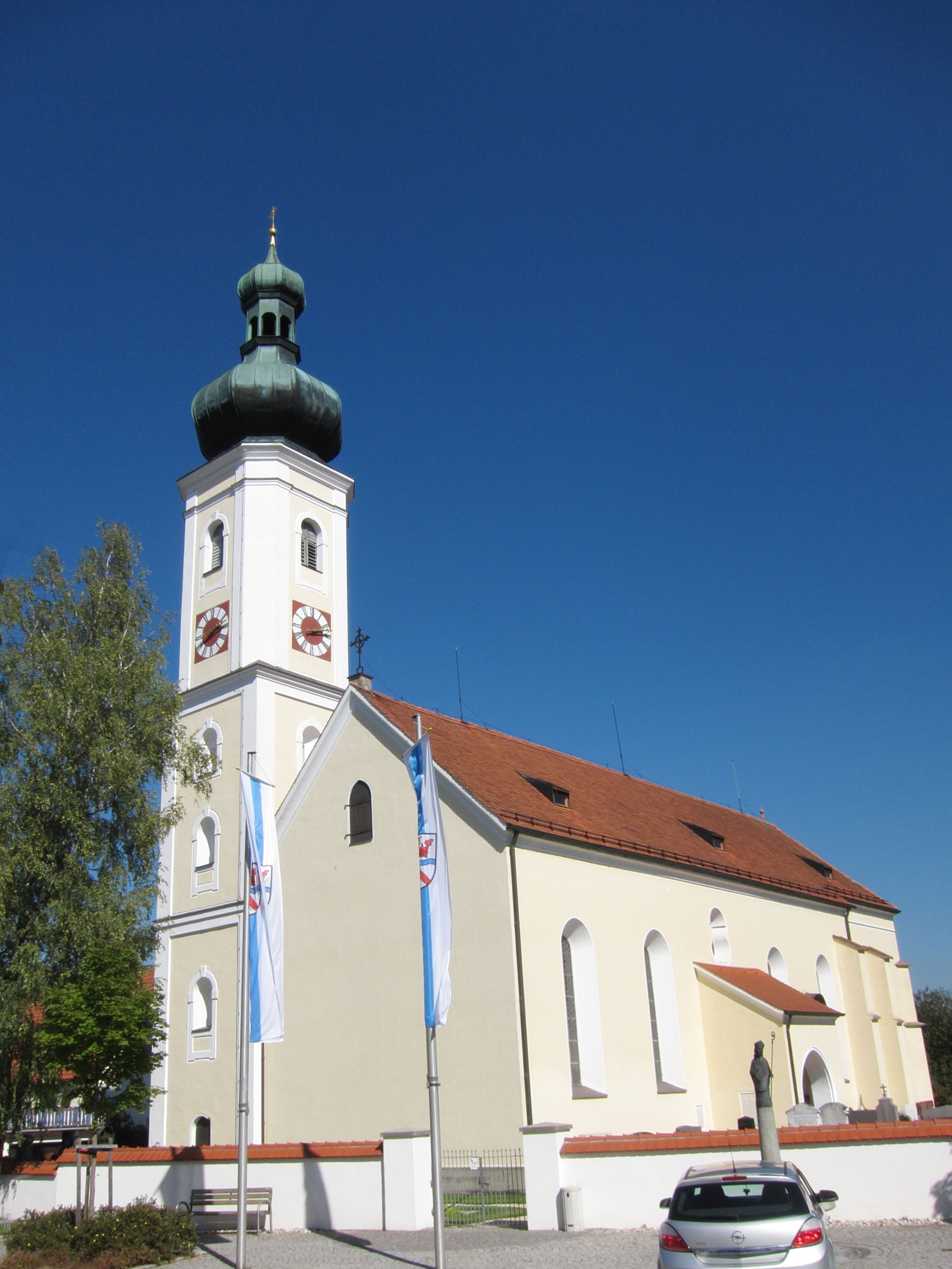 Katholische Pfarrkirche St. Erhard, zweischiffige Wandpfeilerkirche mit Zwiebelturm von 1491 (bez.), von Johann Baptist Lethner 1766 überarbeitet, um zwei Achsen verlängert und Turmneubau 1902/5; mit Ausstattung.